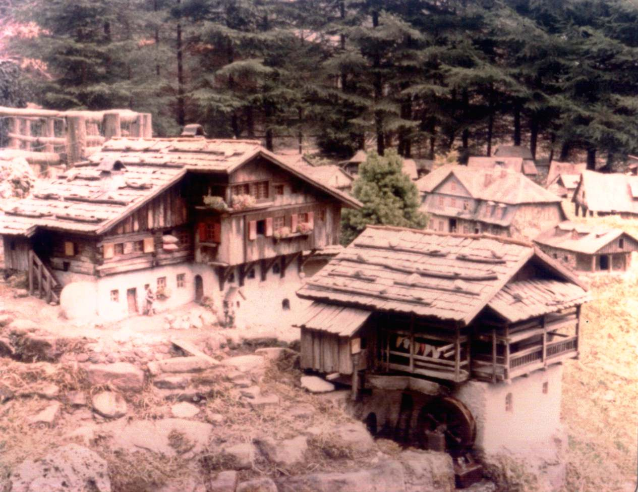 Miniaturmühlen im "Mühlenplatz" (Freilicht-Ausstellung) in Gieselwerder (Oberweser) 1982